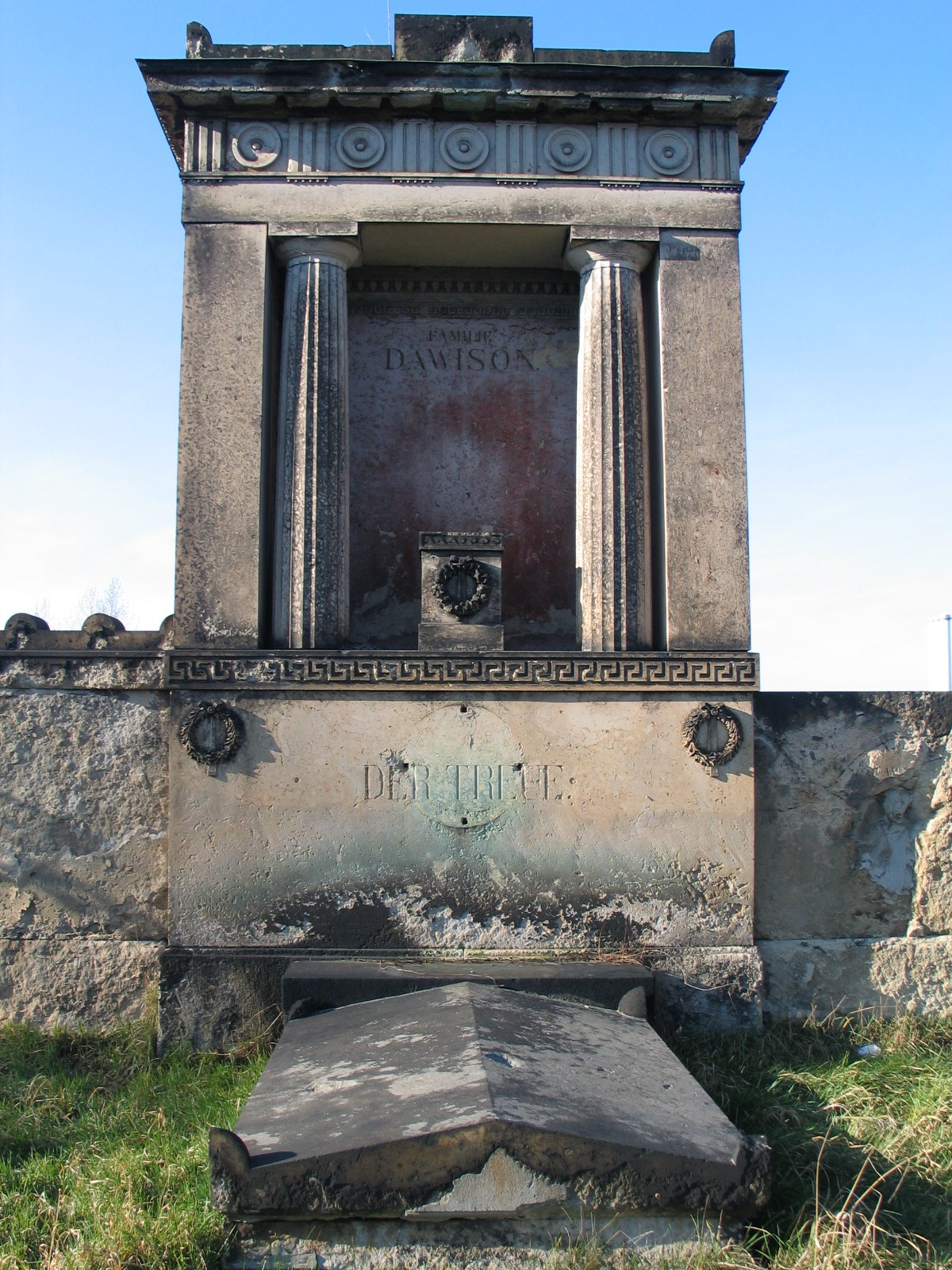 Grab von Bogumil Dawison im Alten Annenfriedhof in der Südvorstadt in Dresden